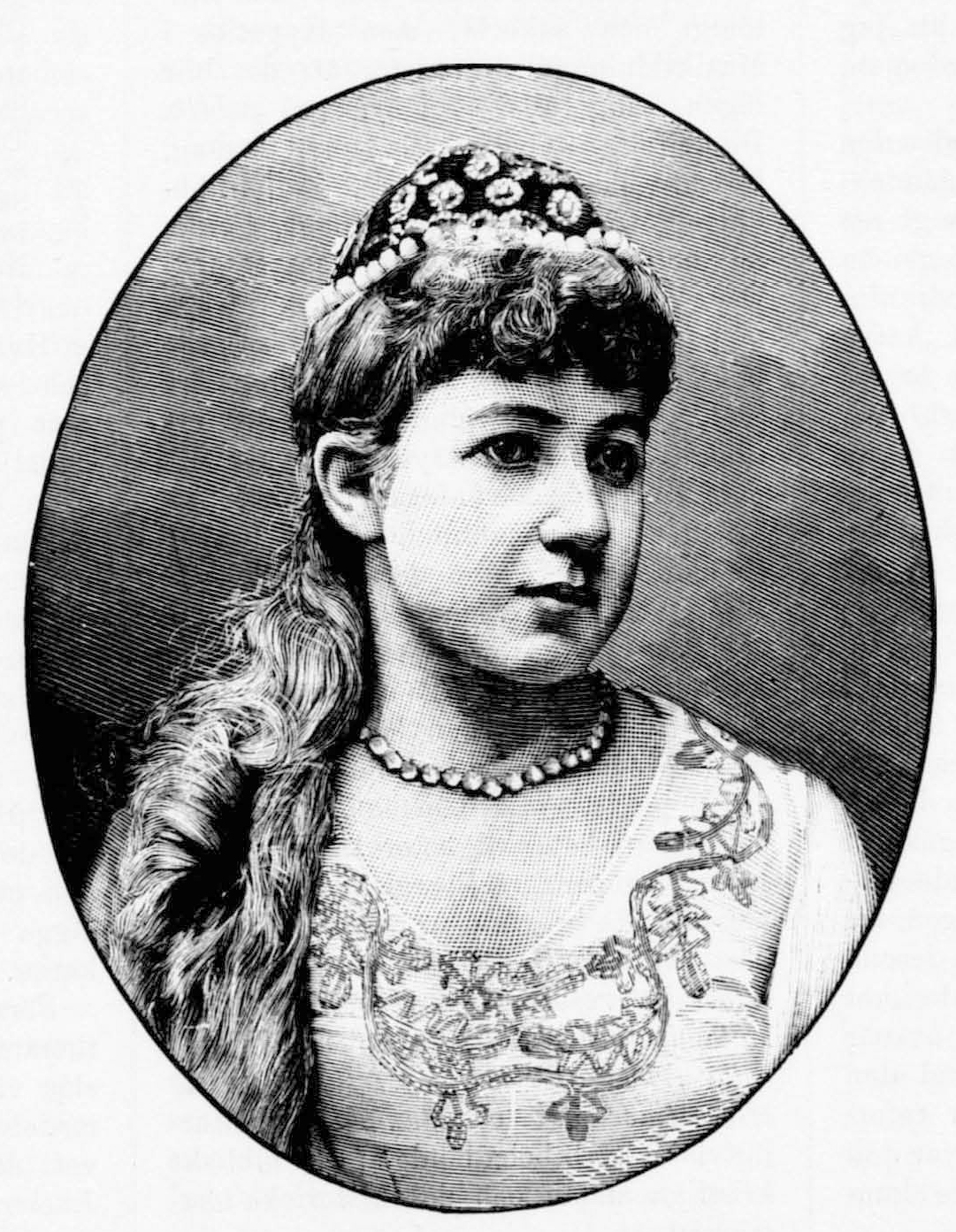 Ida Brag (1866-1921) as Desdemona